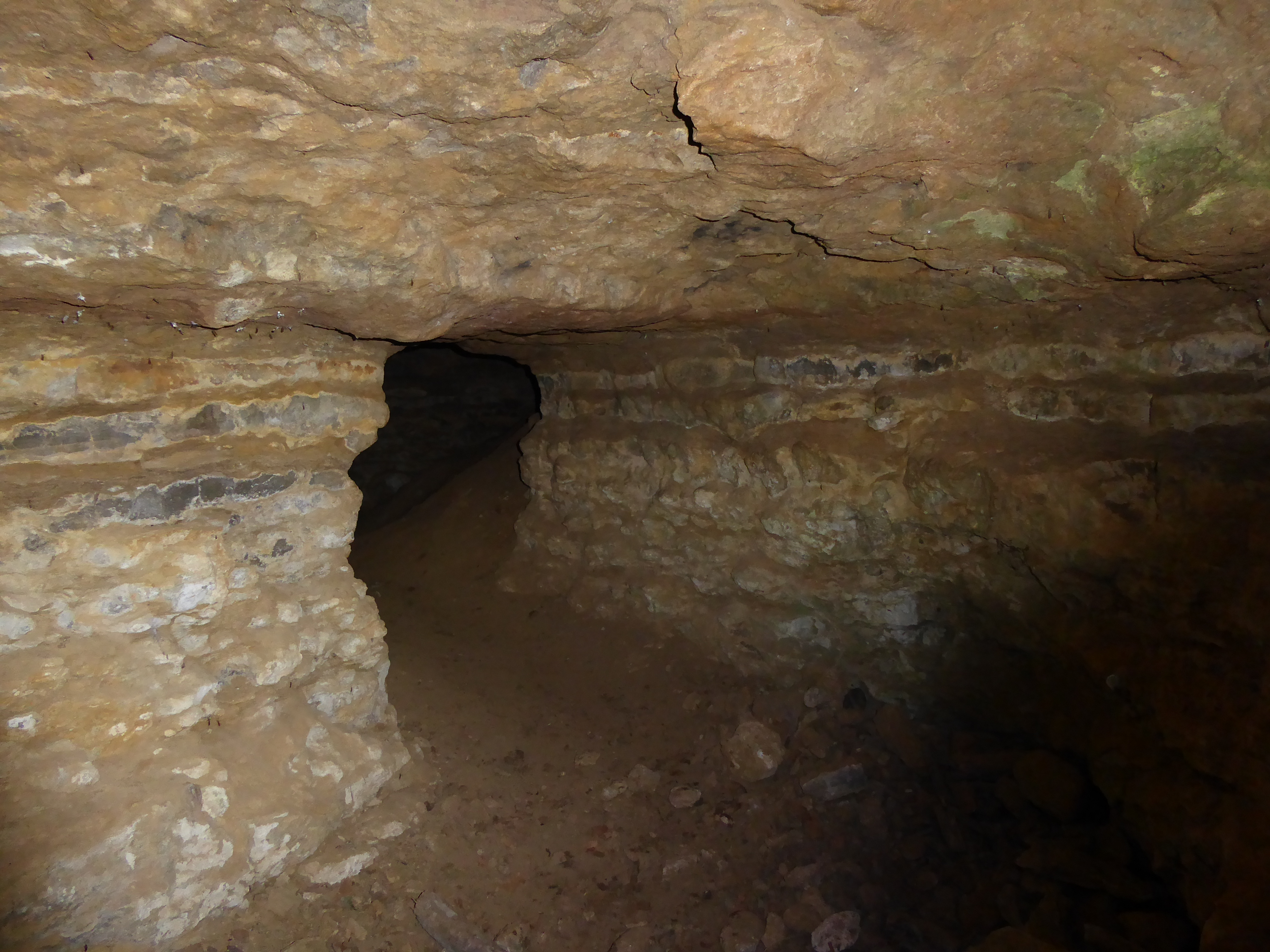 Début de la galerie de la grotte des Sept Salles en rive droite de la Moselle à Pierre-la-Treiche, en Meurthe-et-Moselle (France).